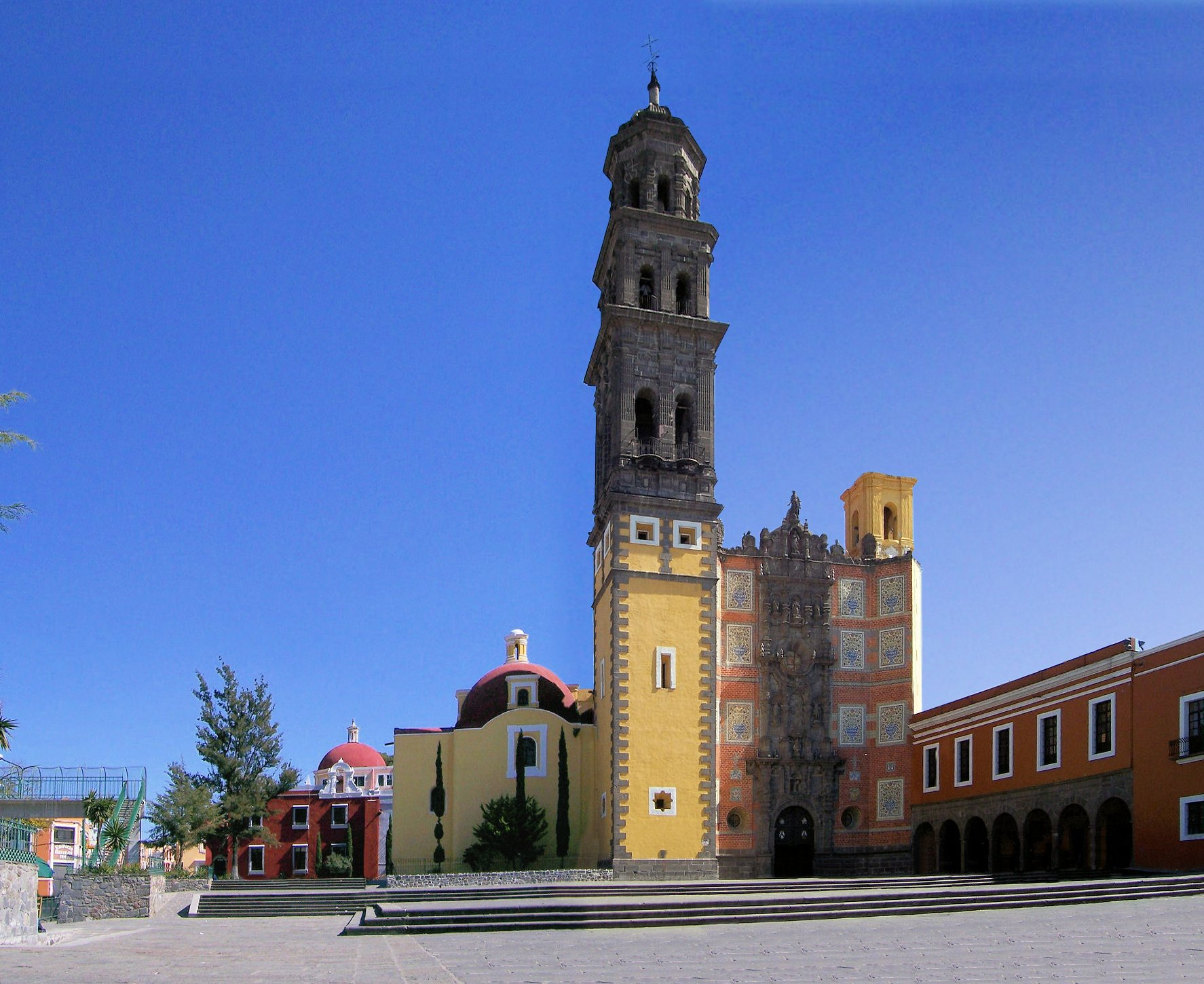 Templo de San Francisco, centro historico de la Ciudad de Puebla, México